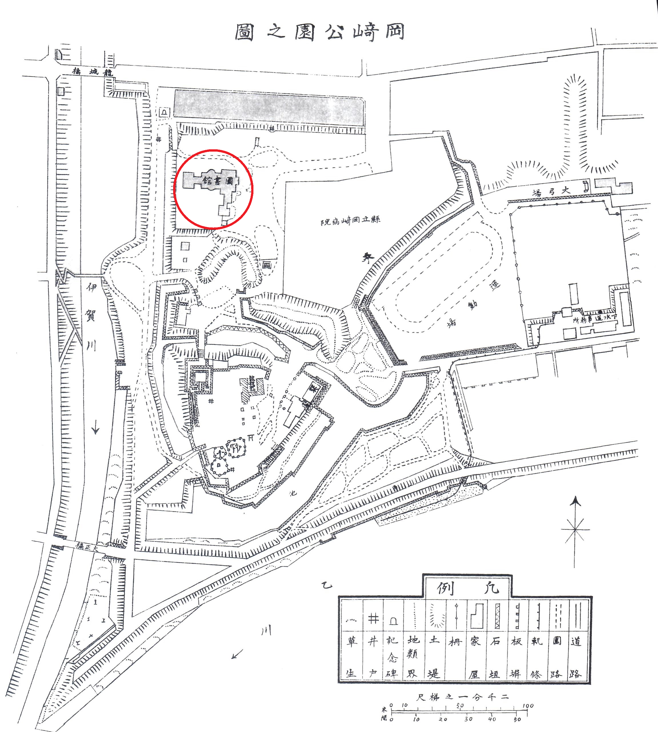 1930年頃の『岡崎公園之圖』。岡崎城に加えて、岡崎市立図書館（左上）、県立岡崎病院（中央）、運動場、大弓場、下水道事務所などの文字が見える。